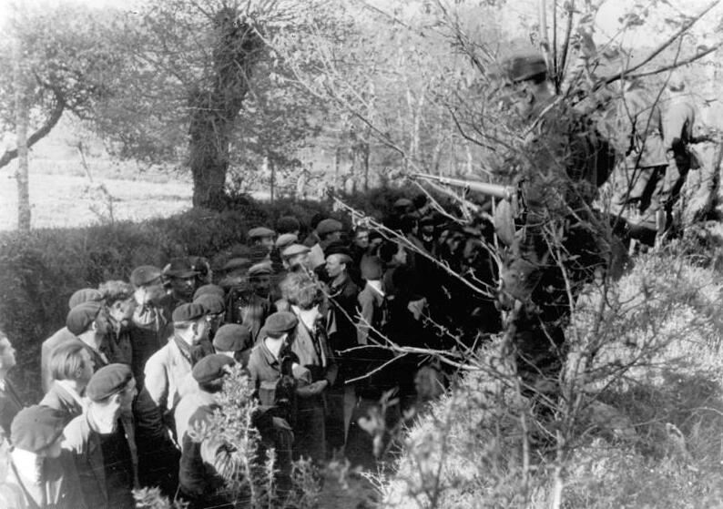 Der rote Maquis in Frankreich Die verdächtig erscheinenden Männer werden beiseite genommen und bis zu ihrer genauen Kontrolle in einem Hohlweg bewacht. Foto: Kriegsberichter Koll